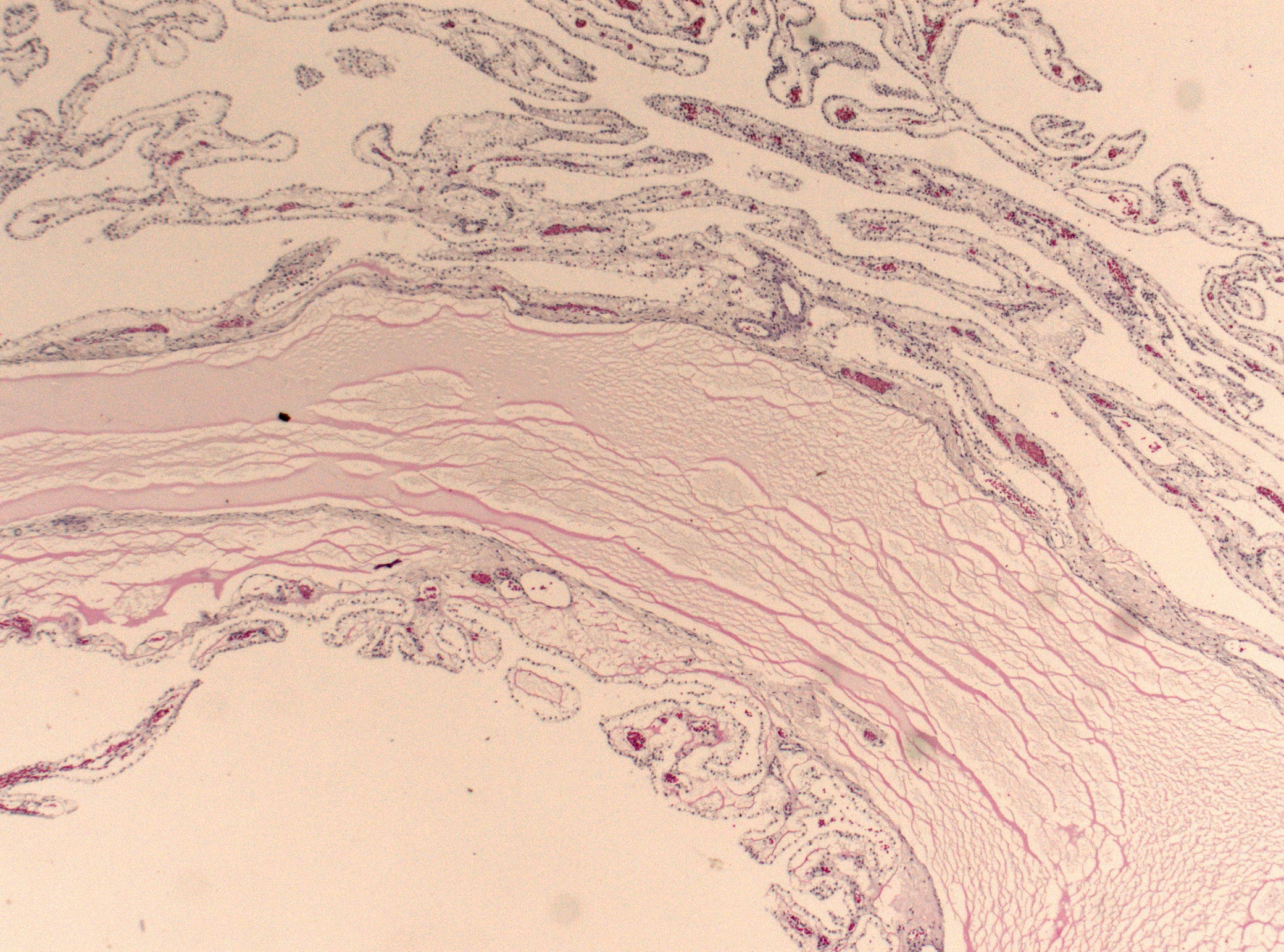 Plexus chorioideus Zyste bei einem Fetern aus der 22. Schwangerschaftswoche mit Trisomie 18